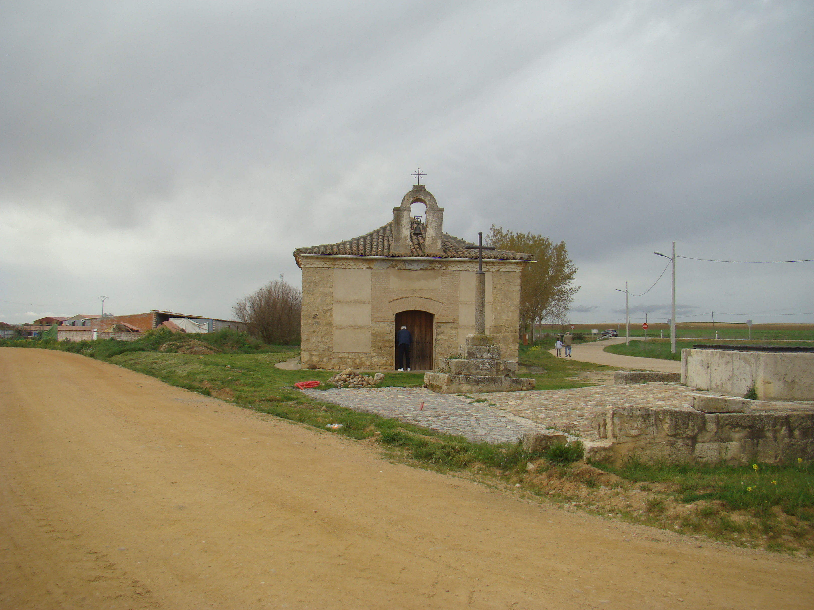 Villalonso, provincia de Zamora, España. Ermita del Santo Cristo de la Vera Cruz.